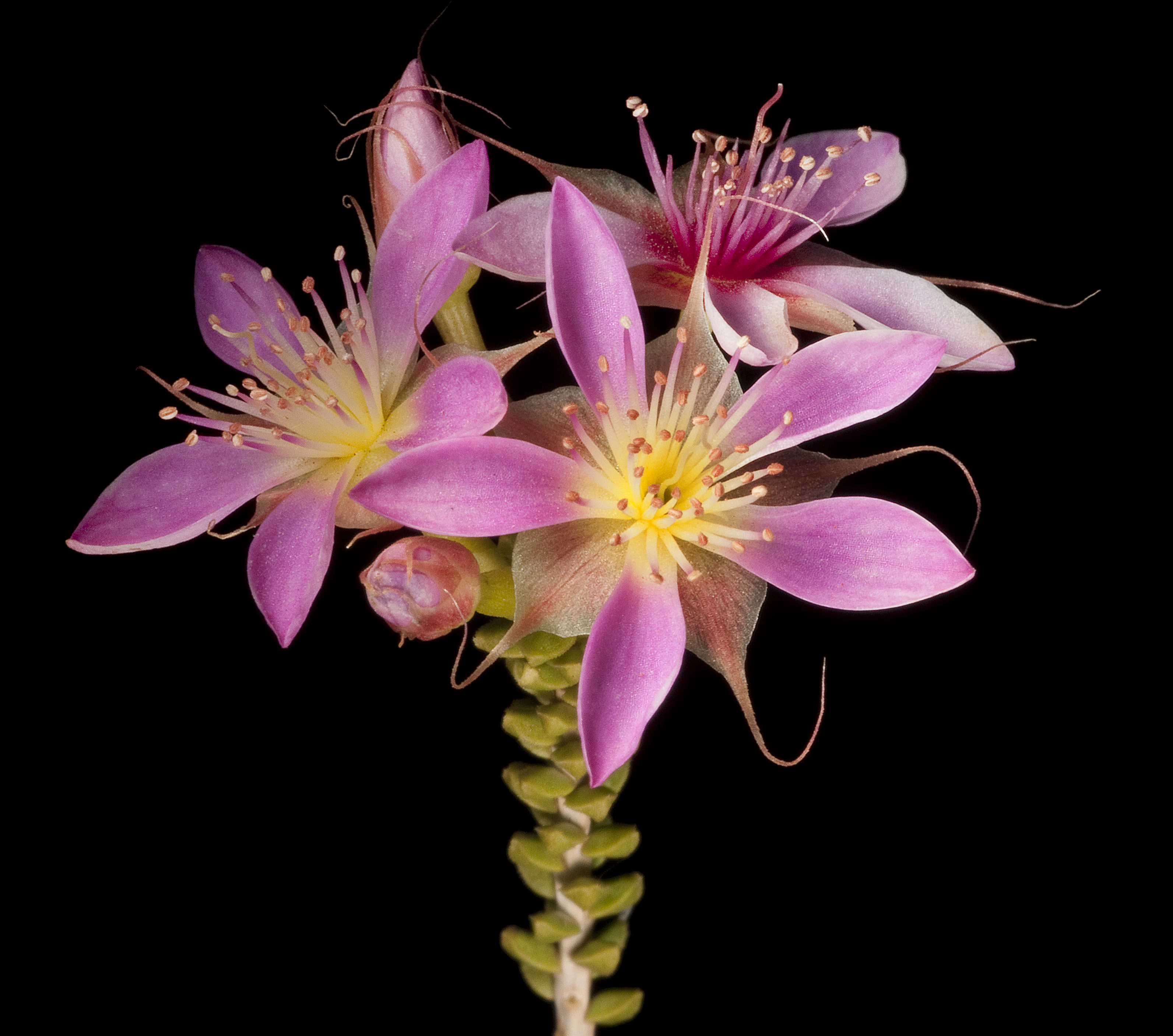 KRT4577